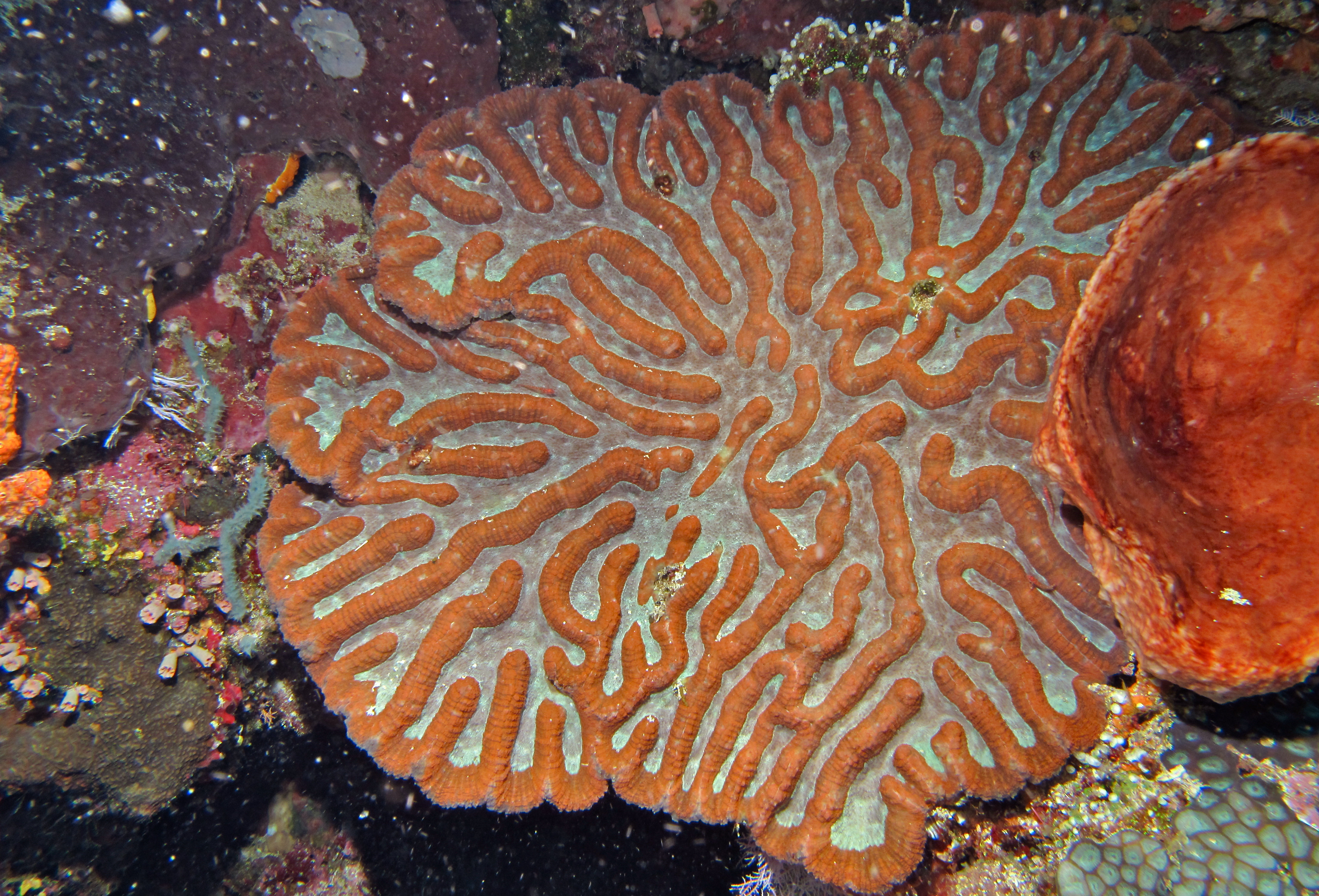 Likuan II, Bunaken Island, Sulawesi, INDONESIA